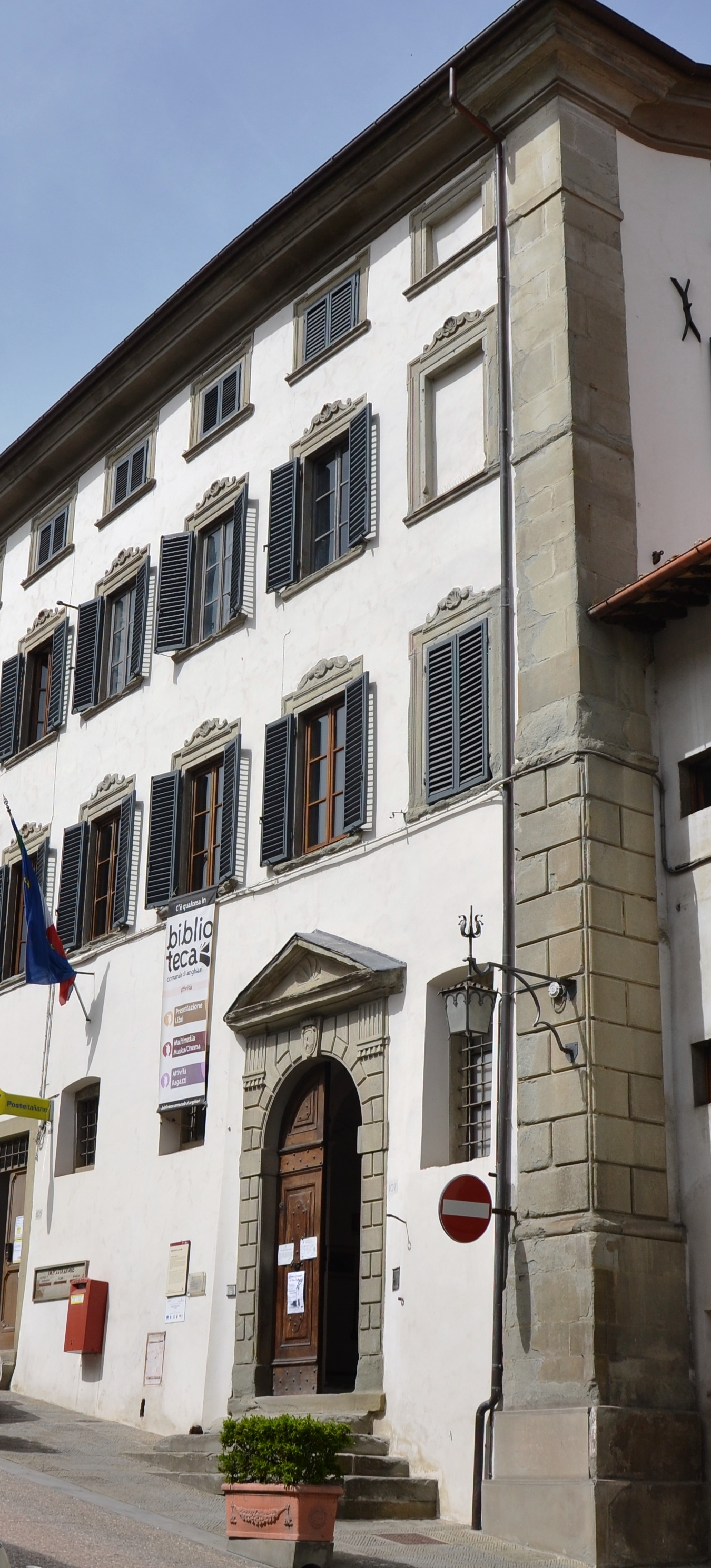 Facciata di Palazzo Corsi, sede della Biblioteca Comunale di Anghiari